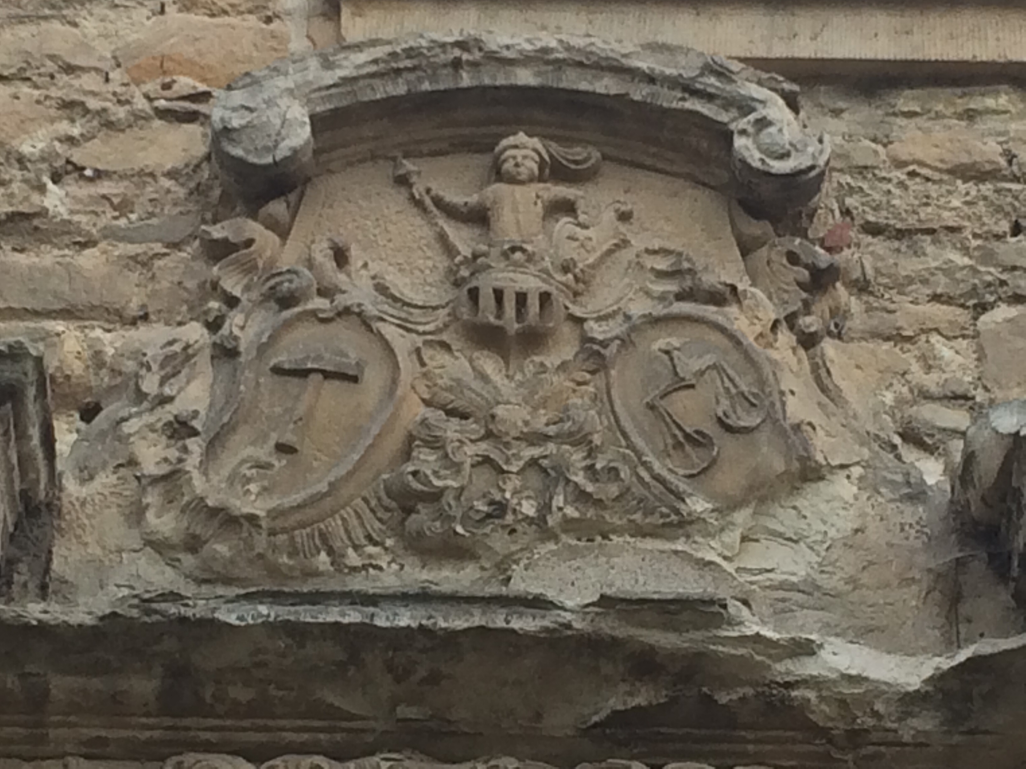 Kloster - Wappenschilder